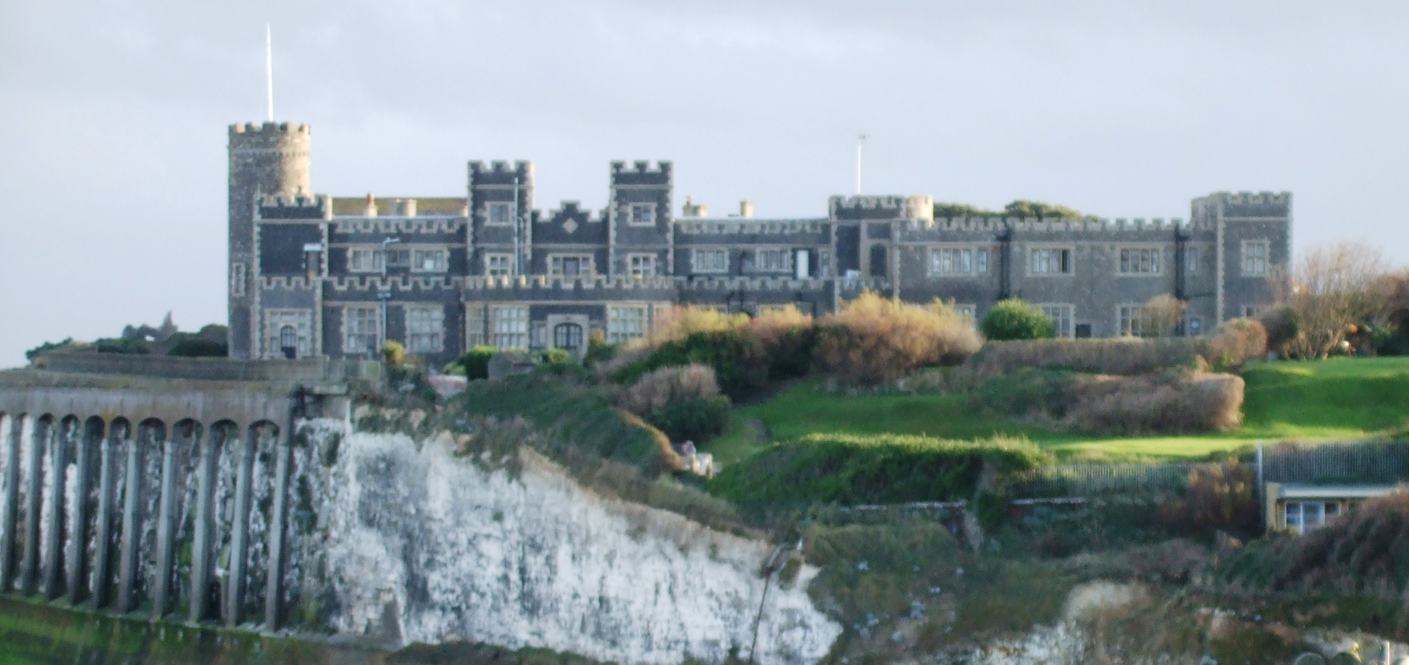 Kingsgate Castle